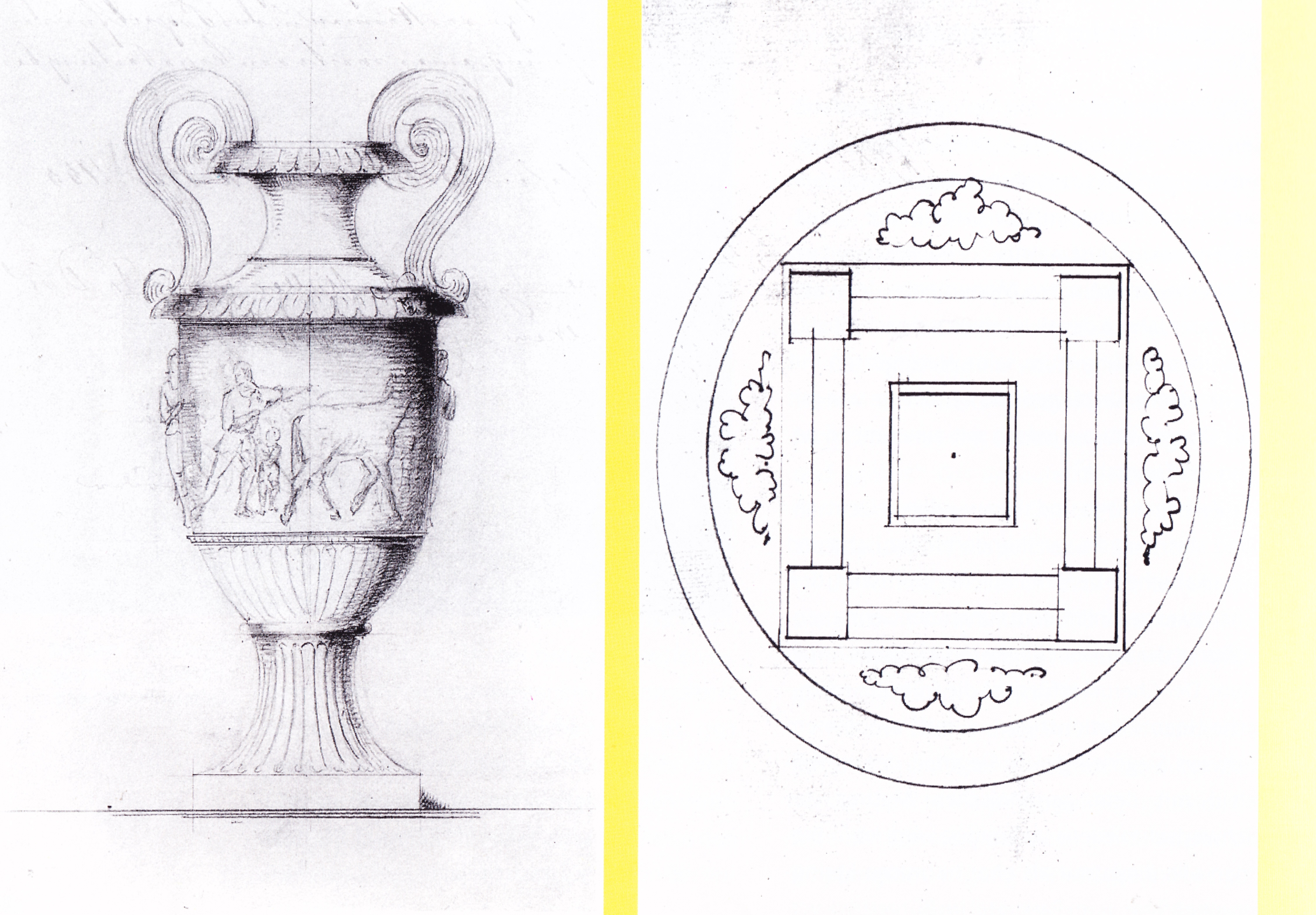 Carl Steinhäuser: Entwurf für eine Marmorvase, 1833